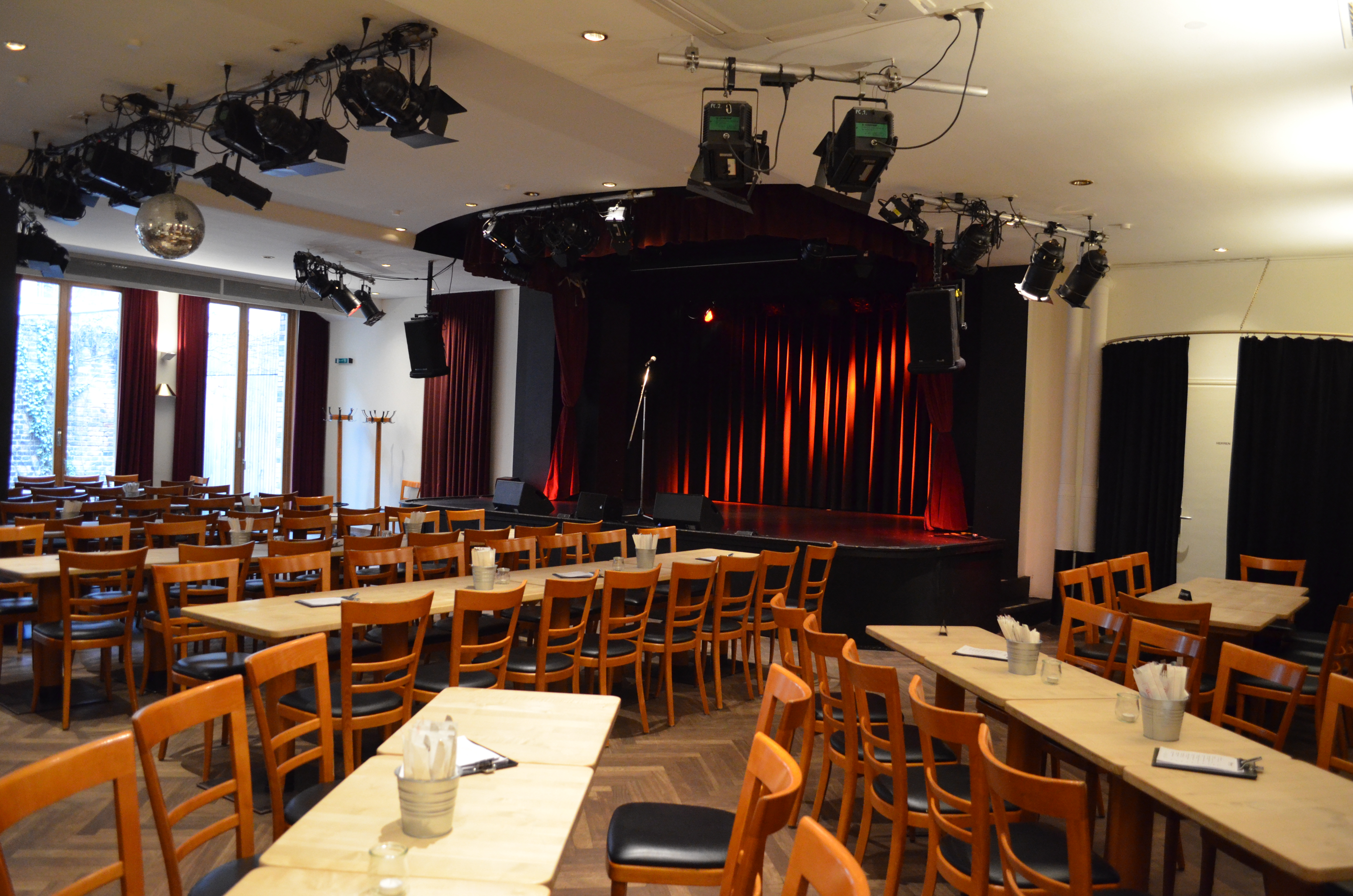 Saal der kleinkunstbühne Rosenau vor Veranstaltungsbeginn